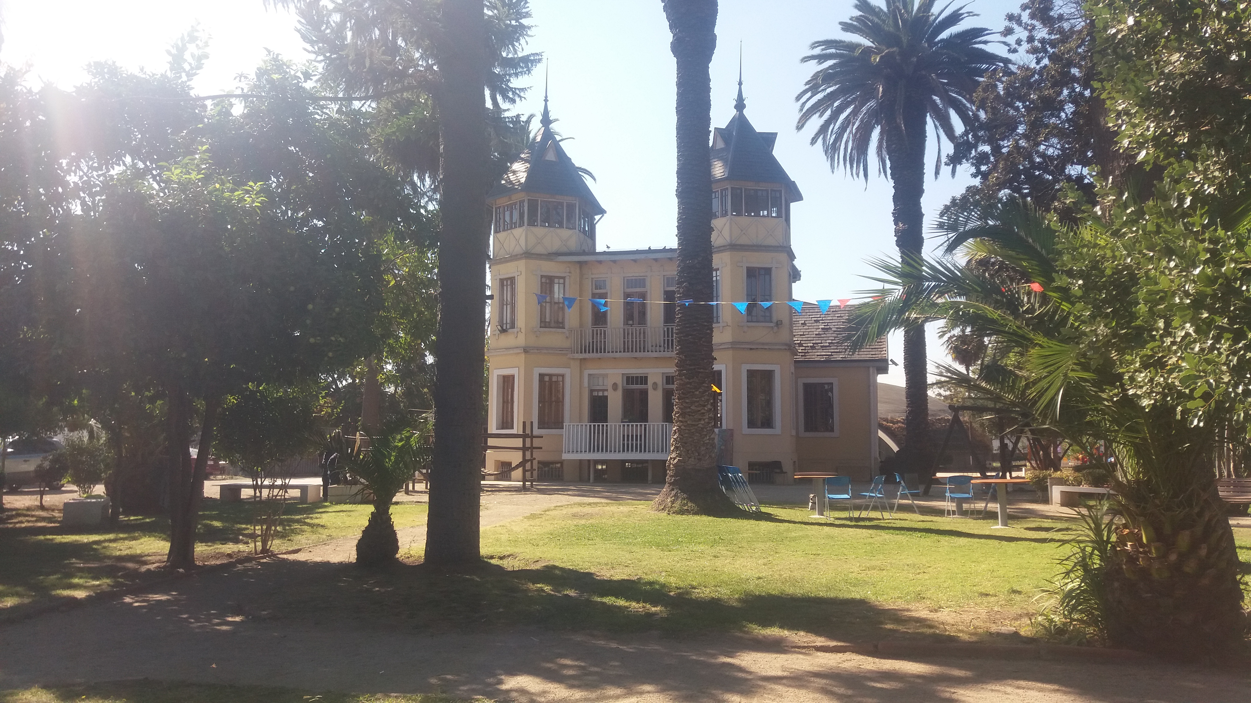 casona